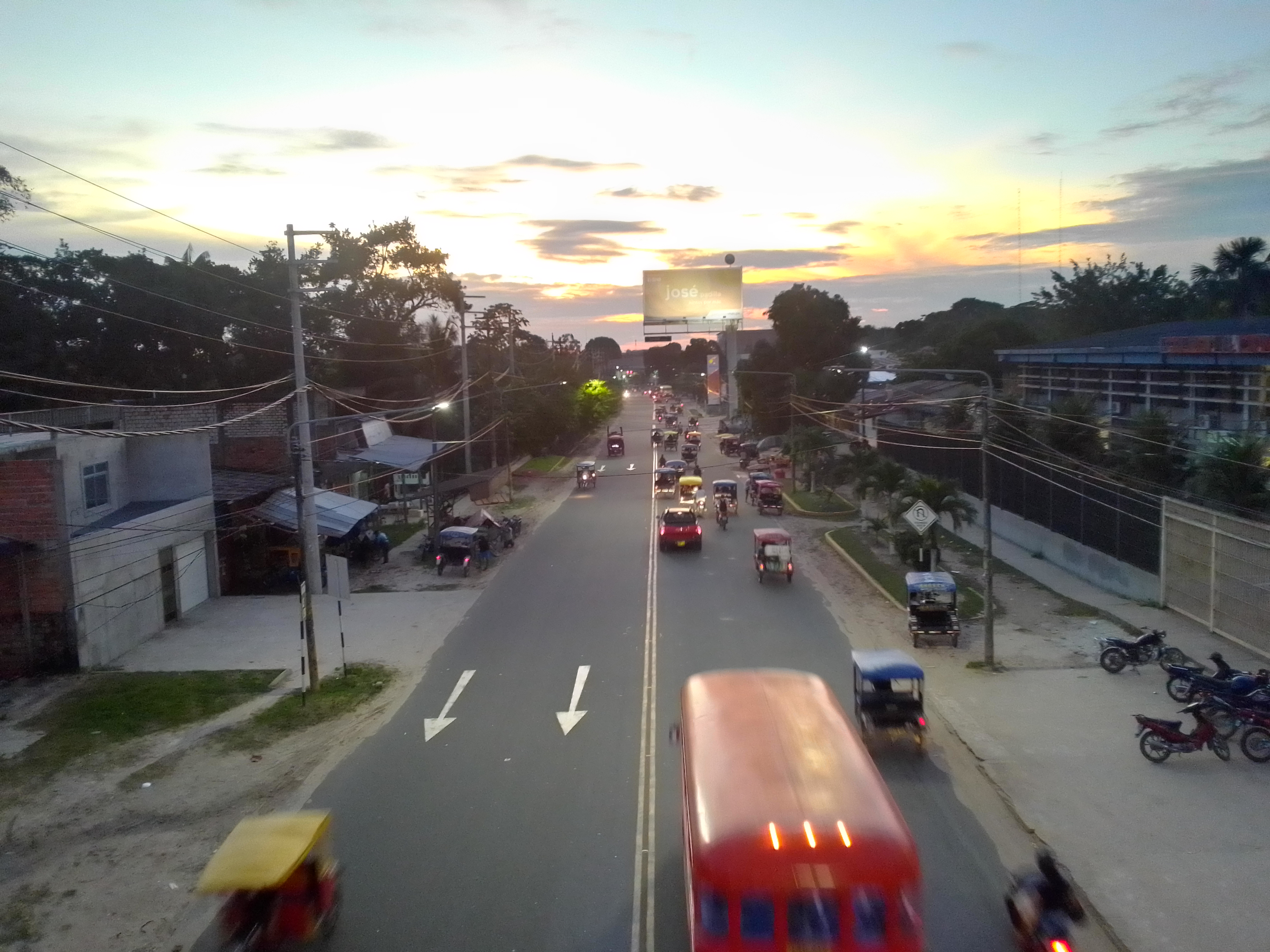 Avenida Quiñones en Iquitos